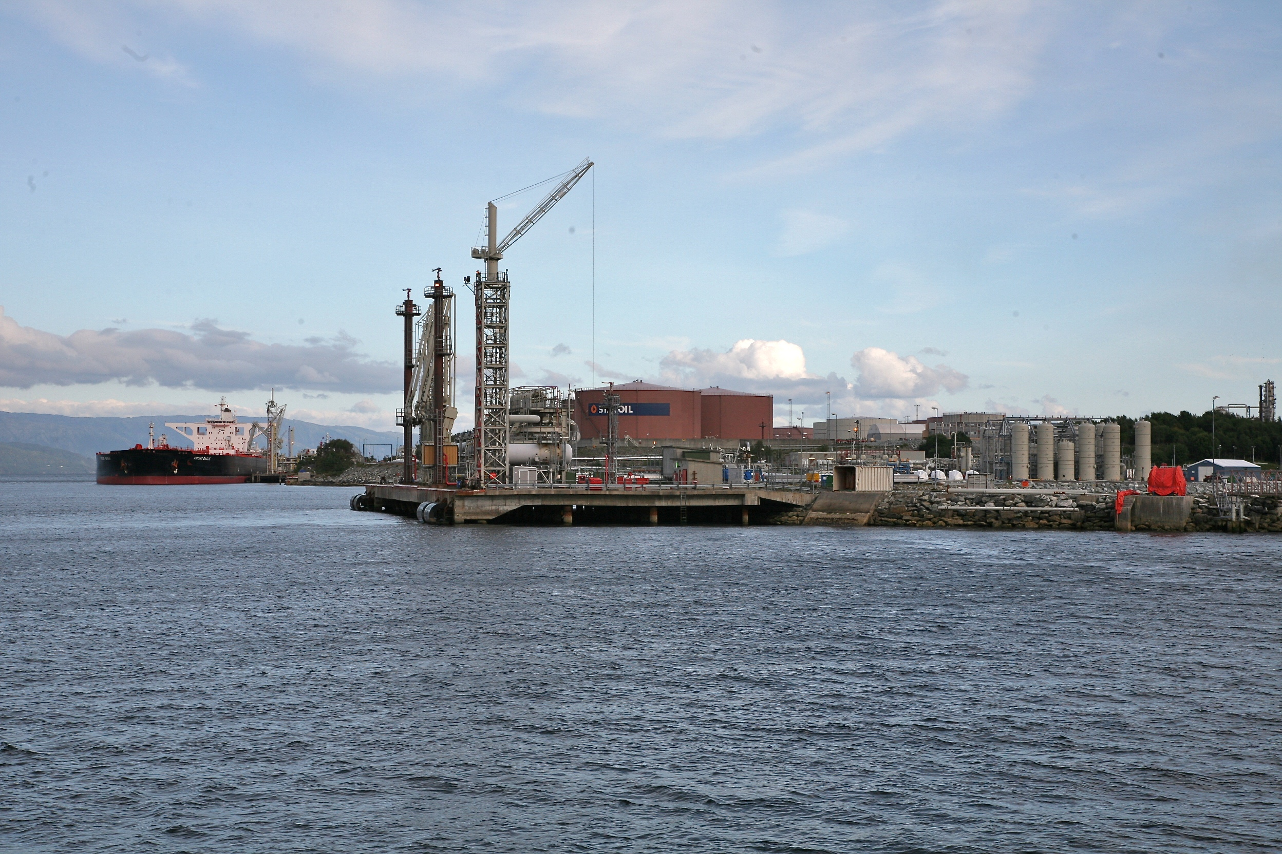 Mongstad